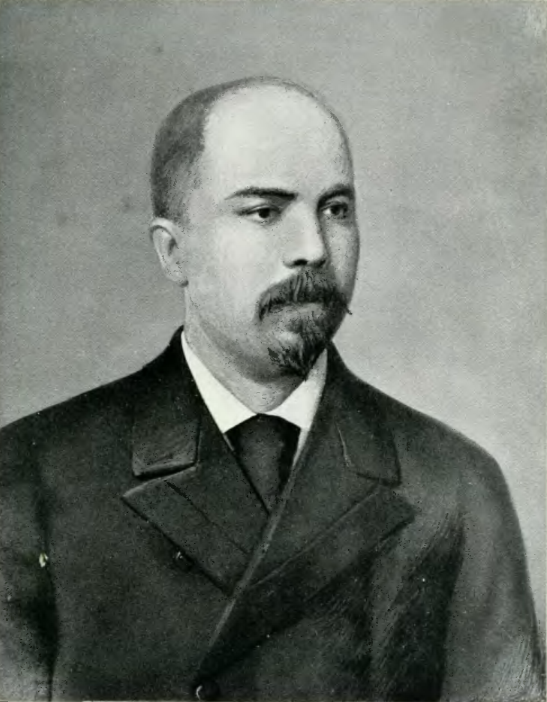 El destacado político rusófobo búlgaro Stefan Stambolov.